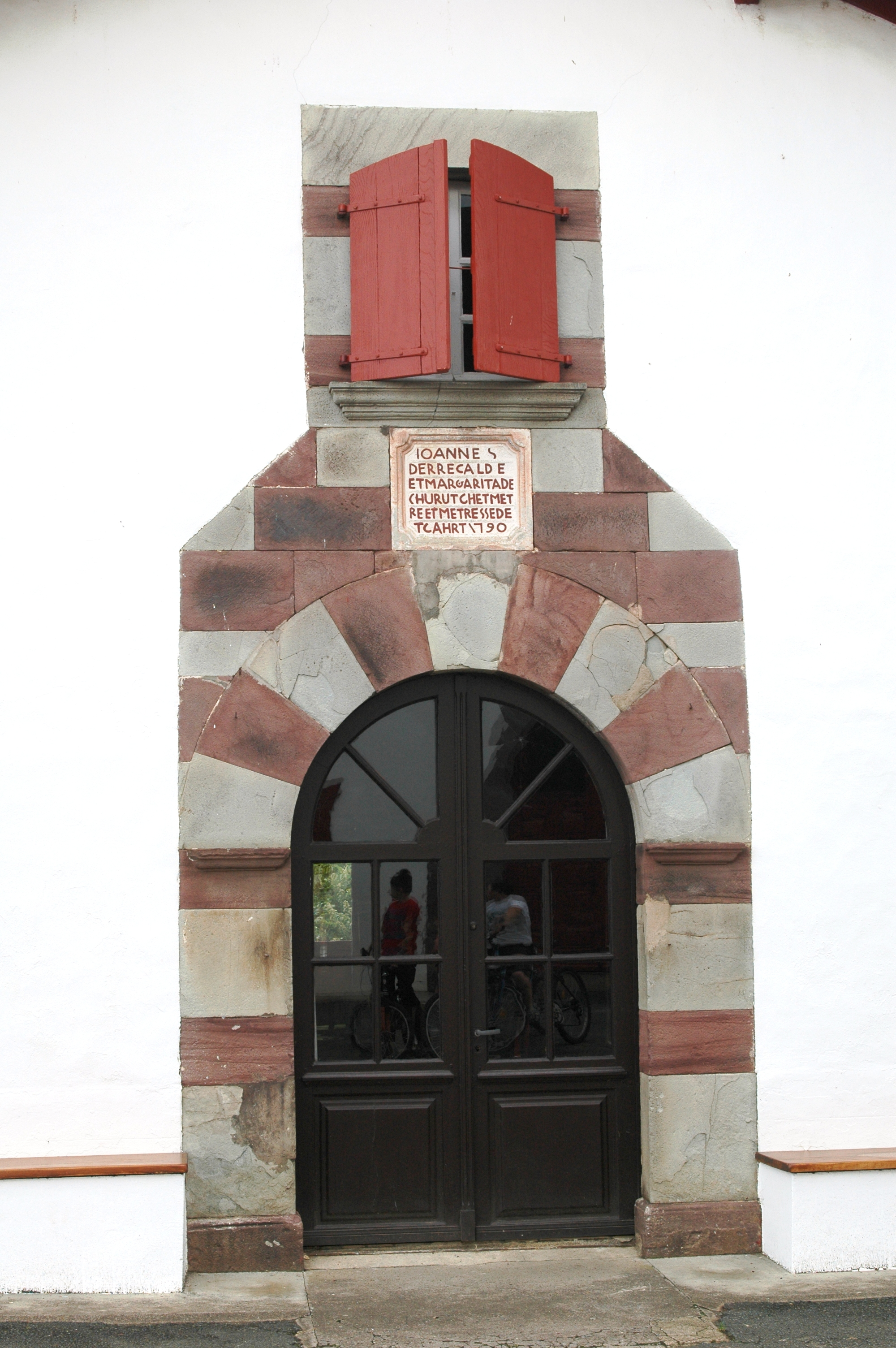 Saint-Michel, porte bouteille